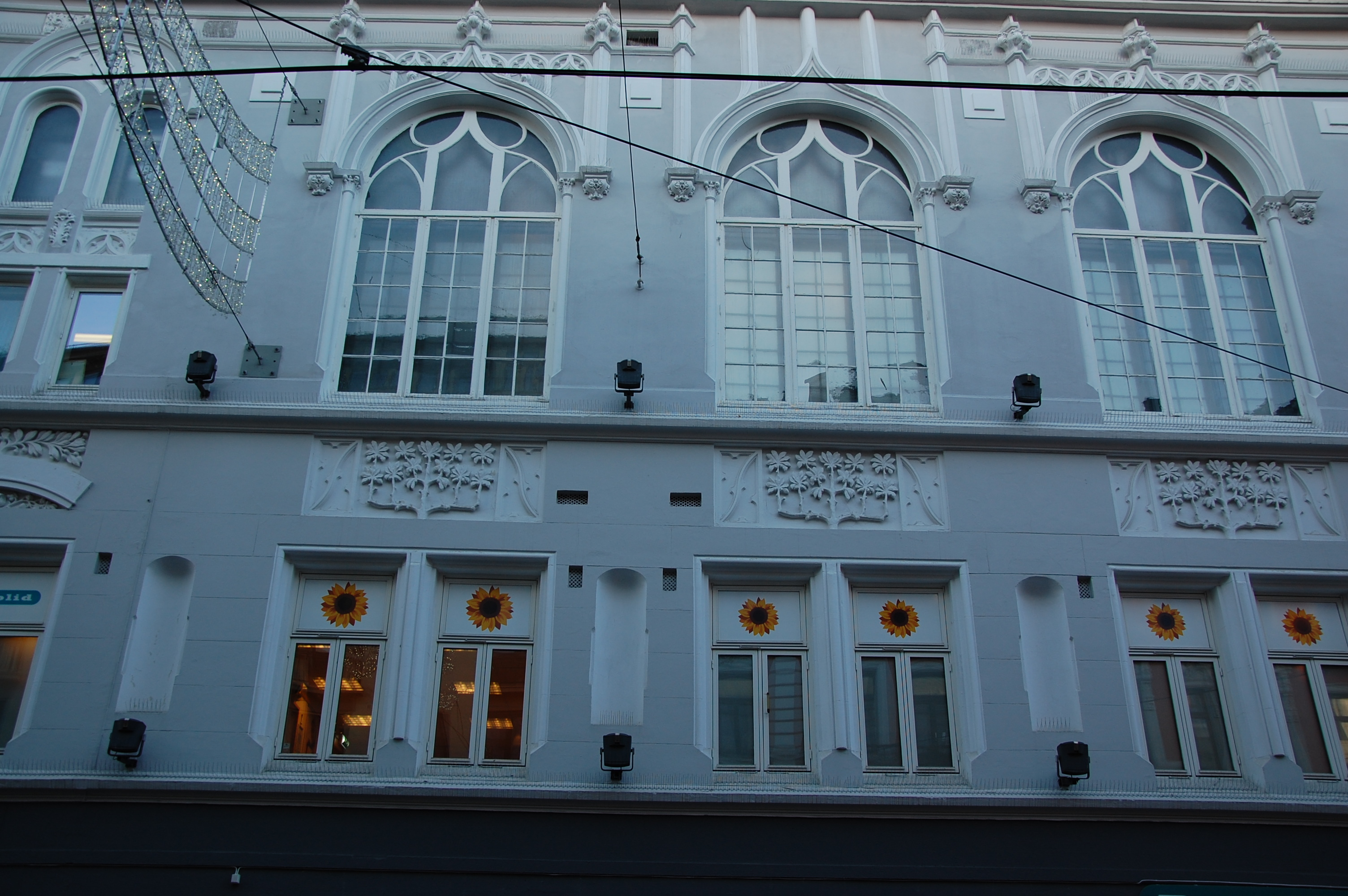 Bogstadveien 49, Bogstadveiens kapell, murgård fra 1899.